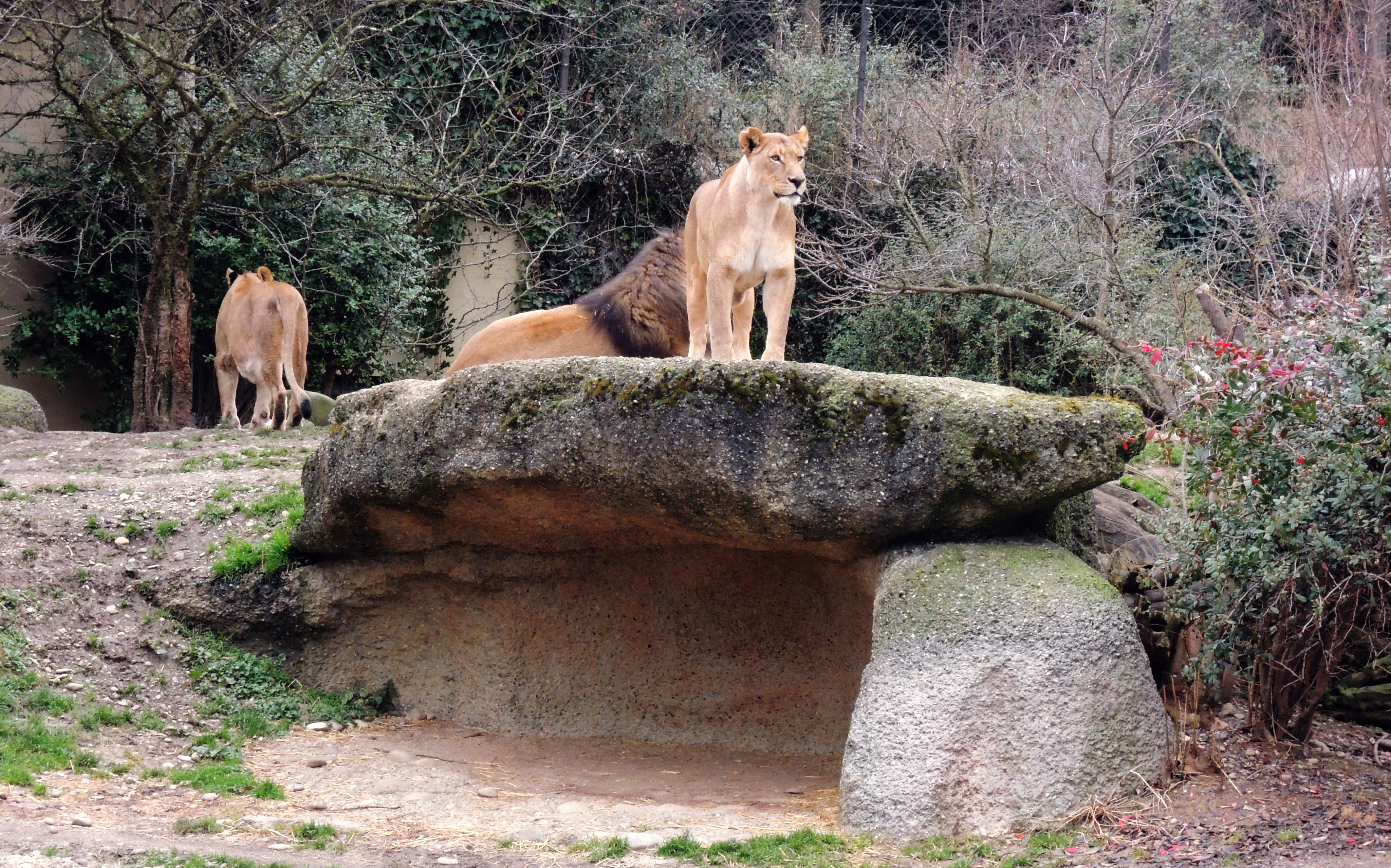 Lwy w bazylejskim ogrodzie zoologicznym.